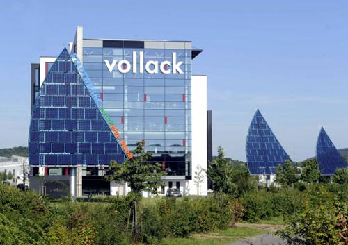 Firmensitz Vollack FORUM 1, Karlsruhe-Durlach